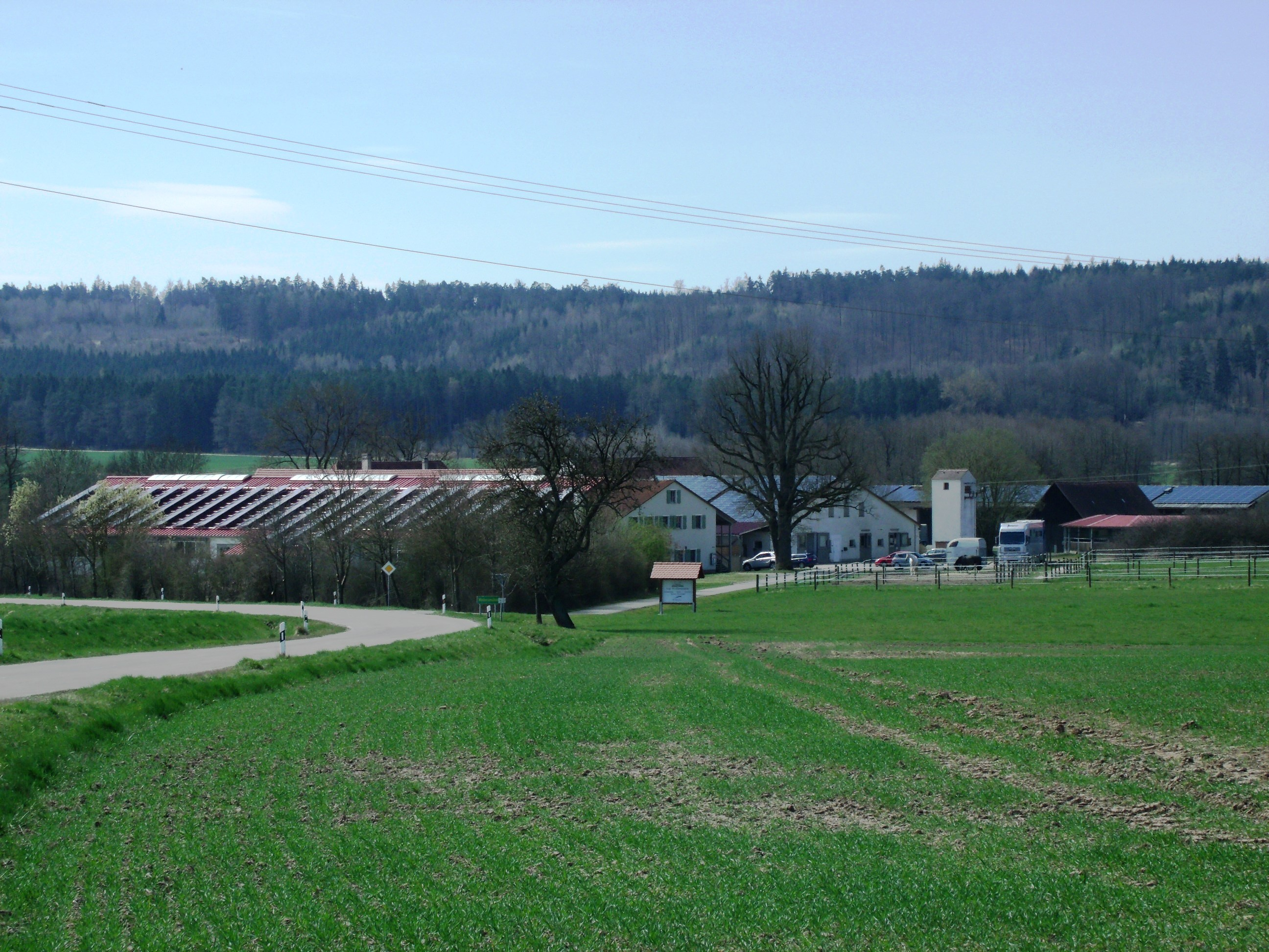 Weihersmühle, Ortsteil von Leutershausen im Landkreis Ansbach